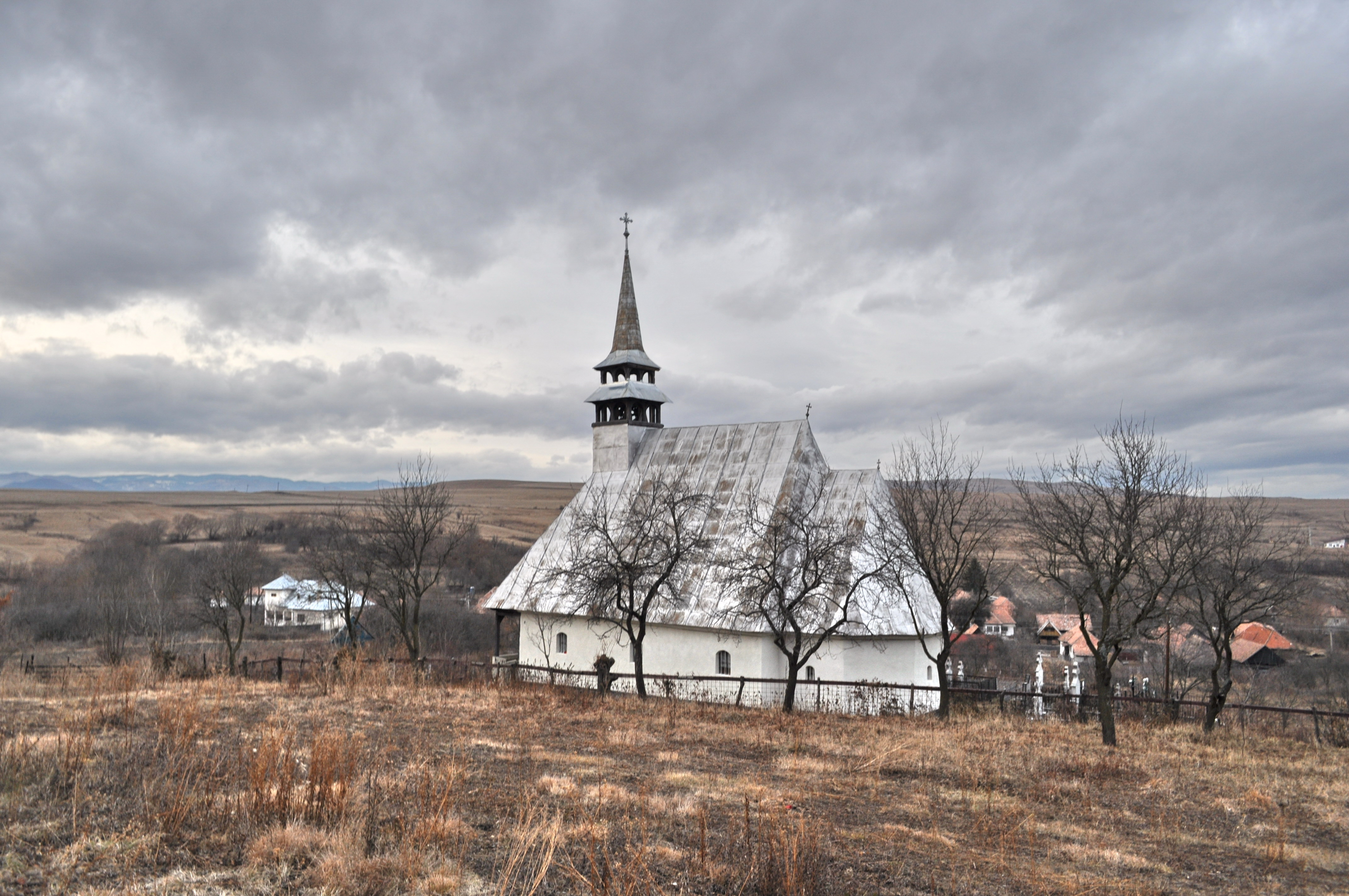 Biserica de lemn "Sf. Arhangheli Mihail şi Gavriil" , sat LIVADA; comuna PETREŞTII DE JOS